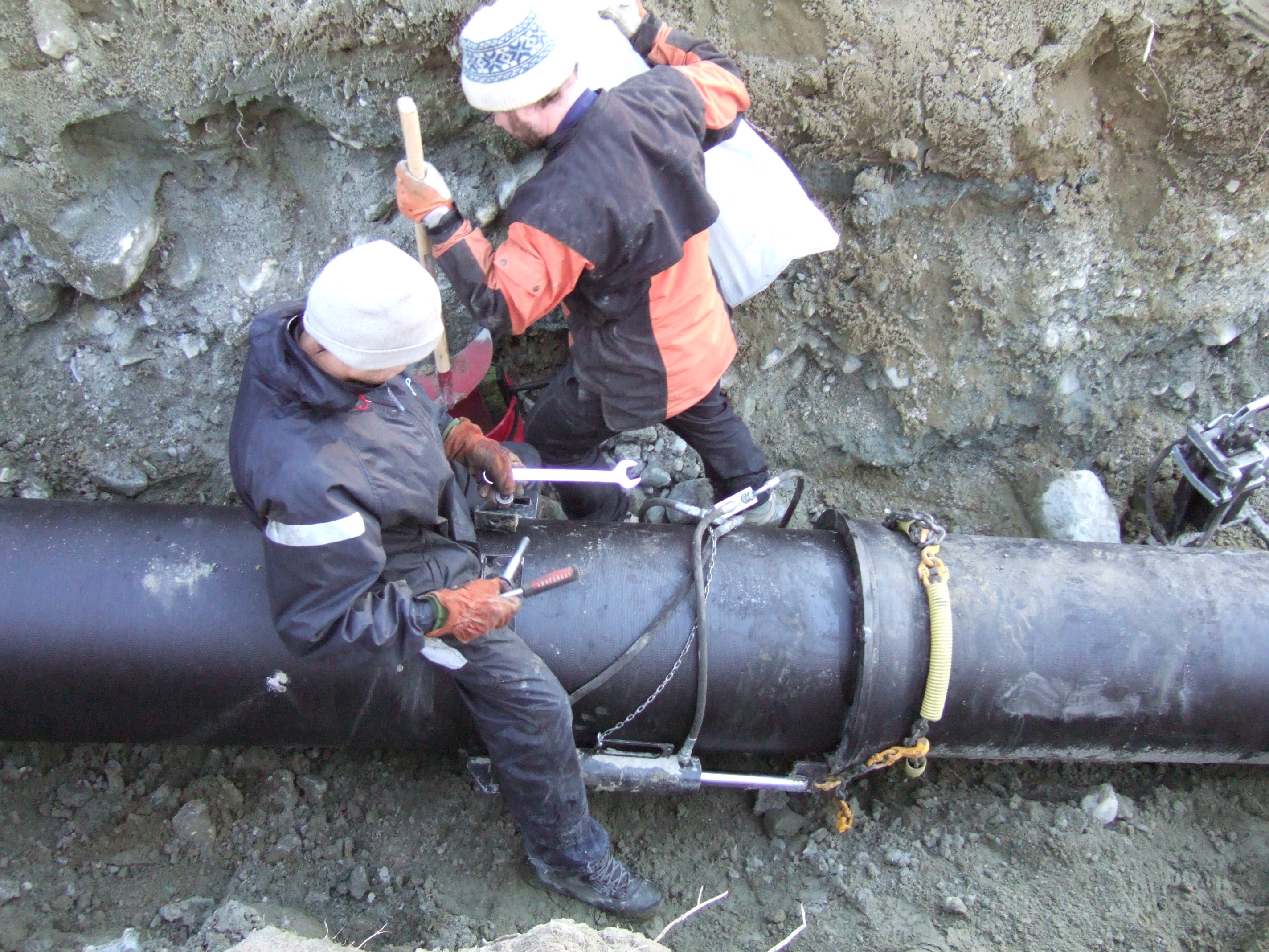 Installation of ductile cast iron pipes. Norway.